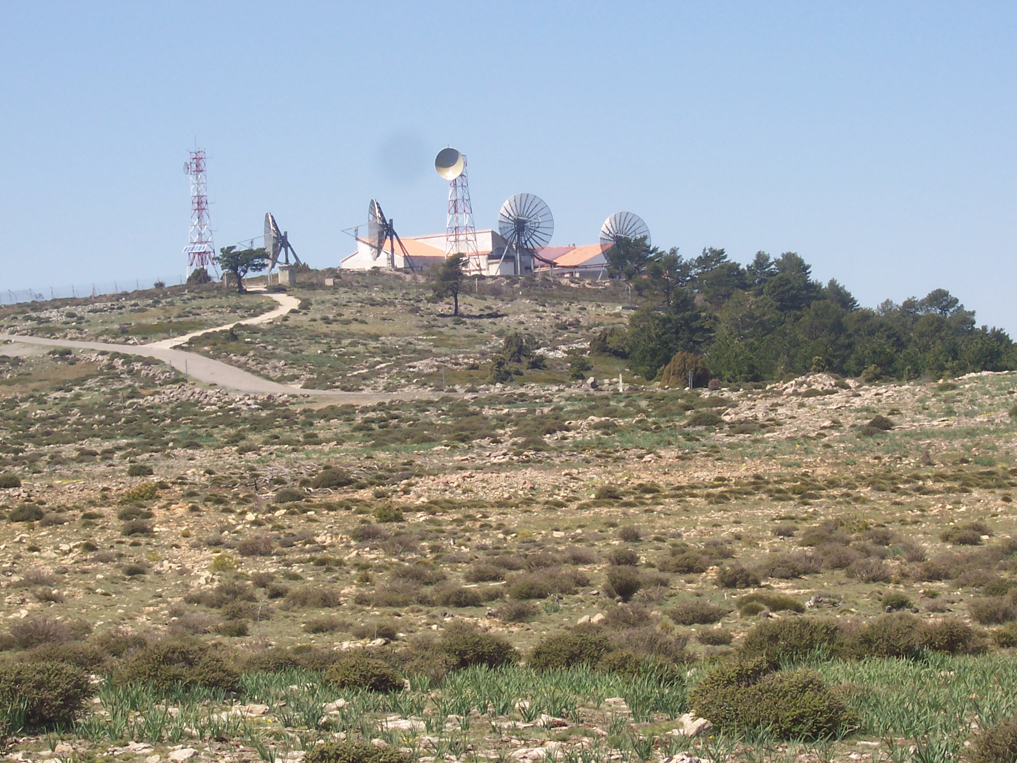 Vista de la Salada y la base militar desde la vertiente este.